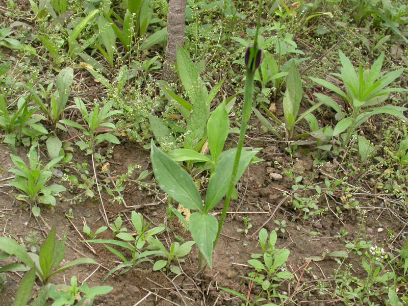 自攝於清華園 Pinellia ternata